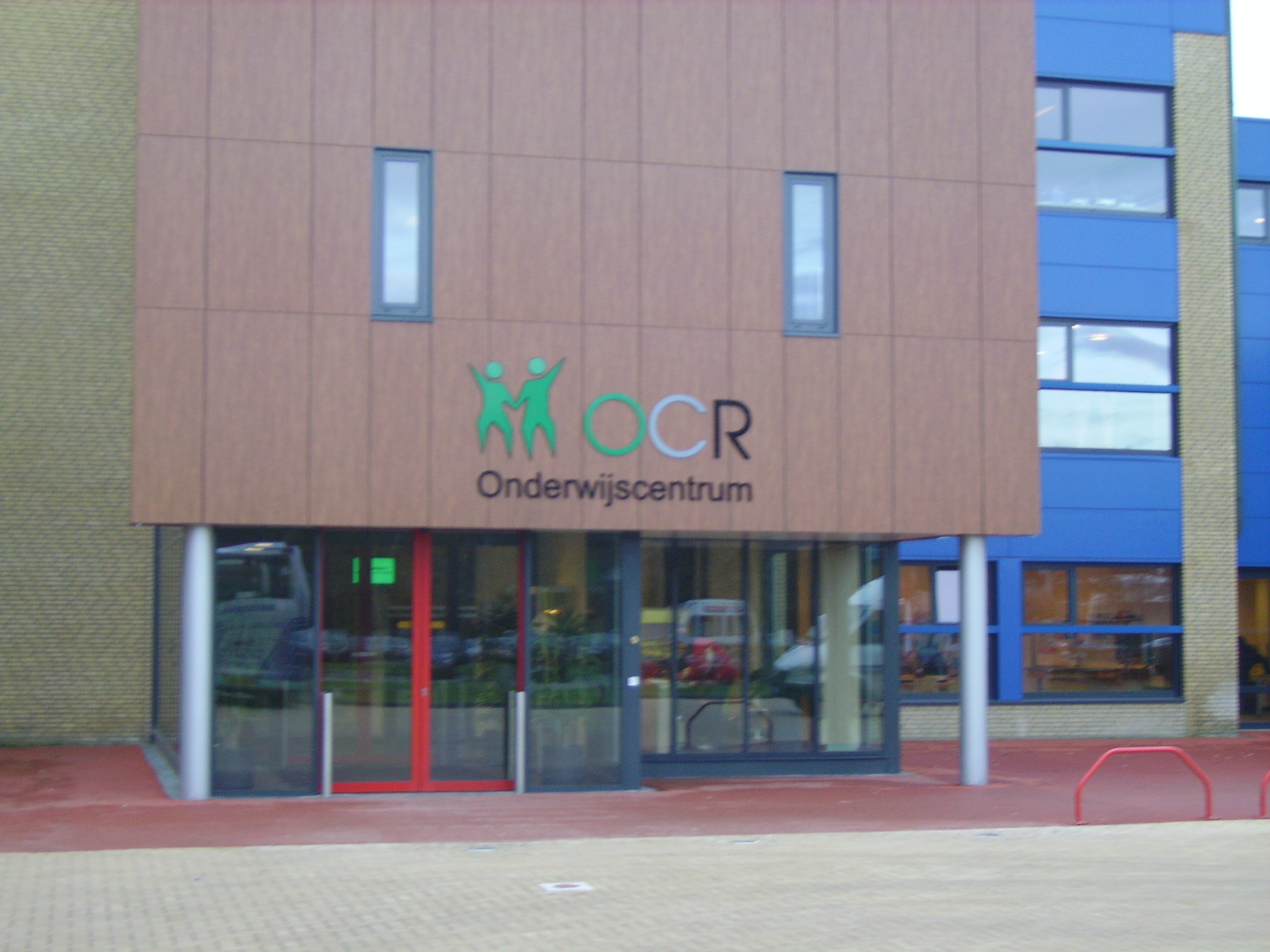 Onderwijscentrum het Roessingh Enschede